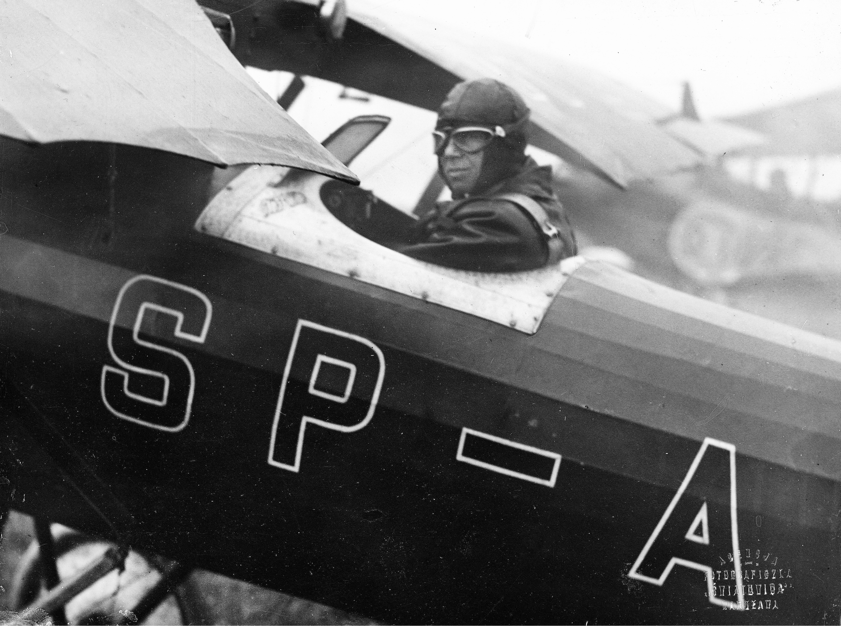 Samolot DKD-III pilotowany przez Jana Gaździka podczas III Krajowego Konkursu Awionetek w Warszawie.